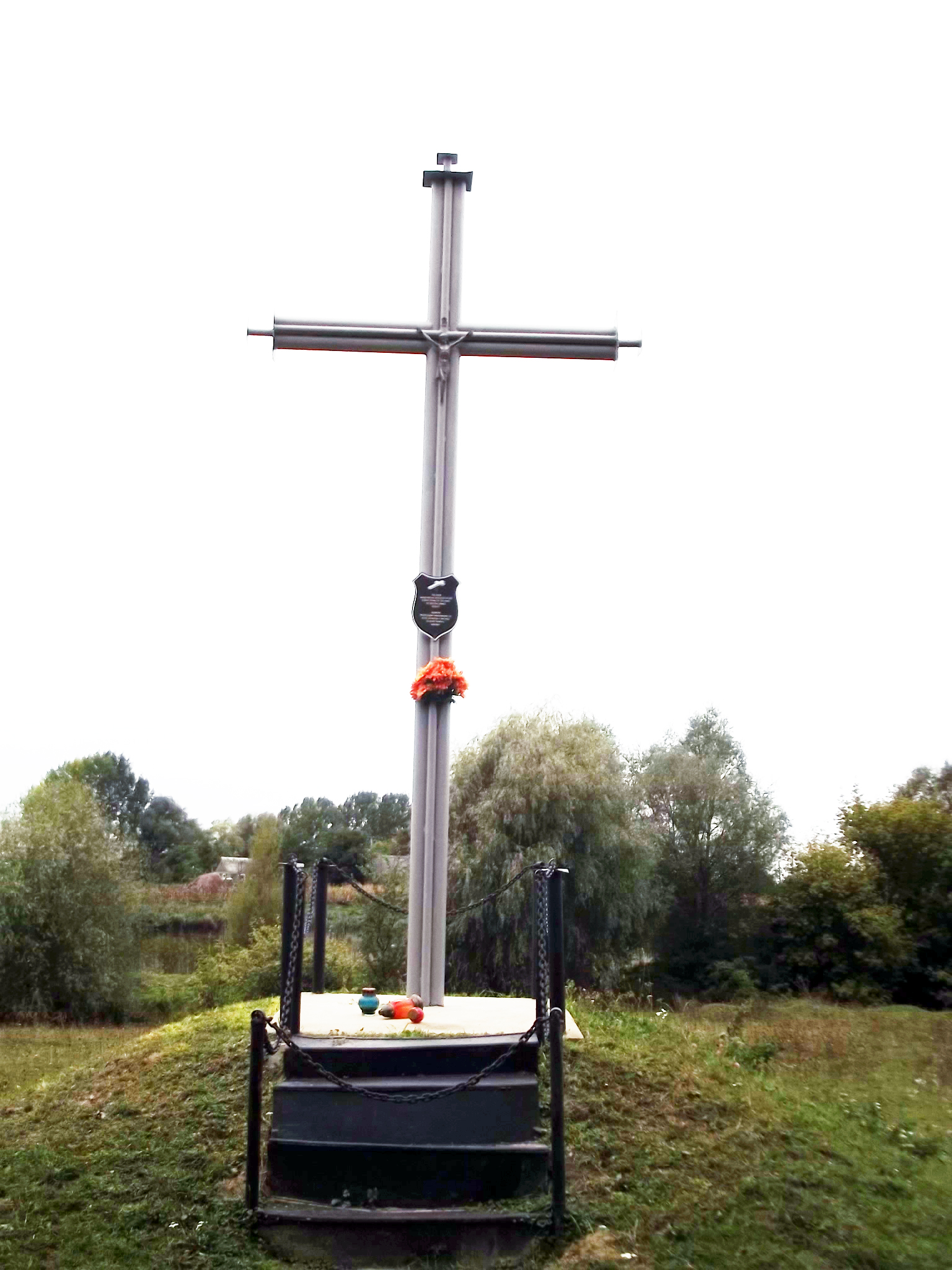 Пам'ятний хрест загиблим полякам в с. Селець Володимир-Волинського району